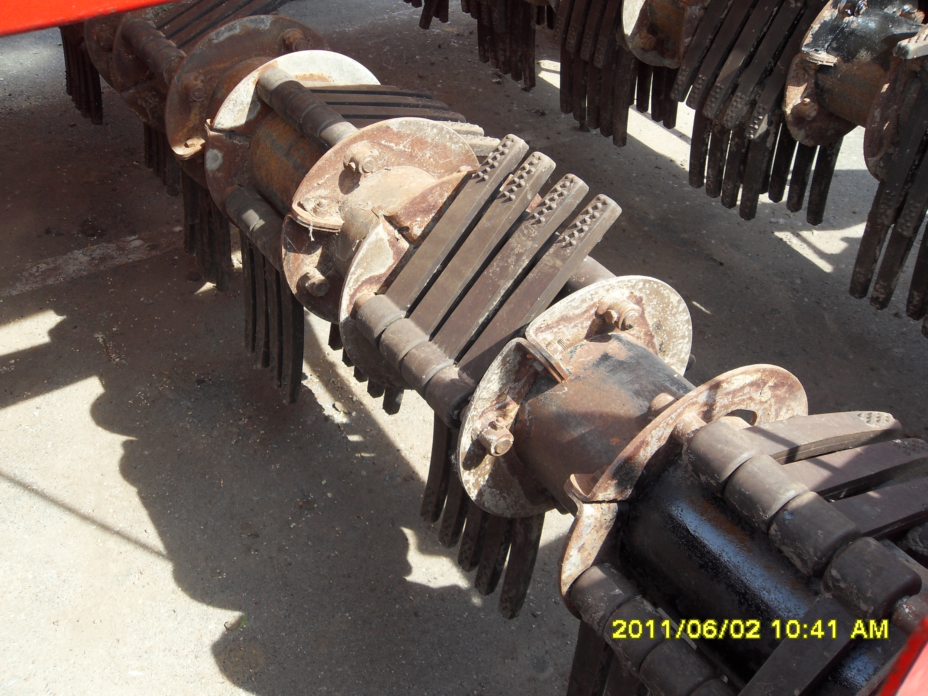 Внутрішня будова машини для подрібнення гички буряків перед викопуванням коренеплодів.